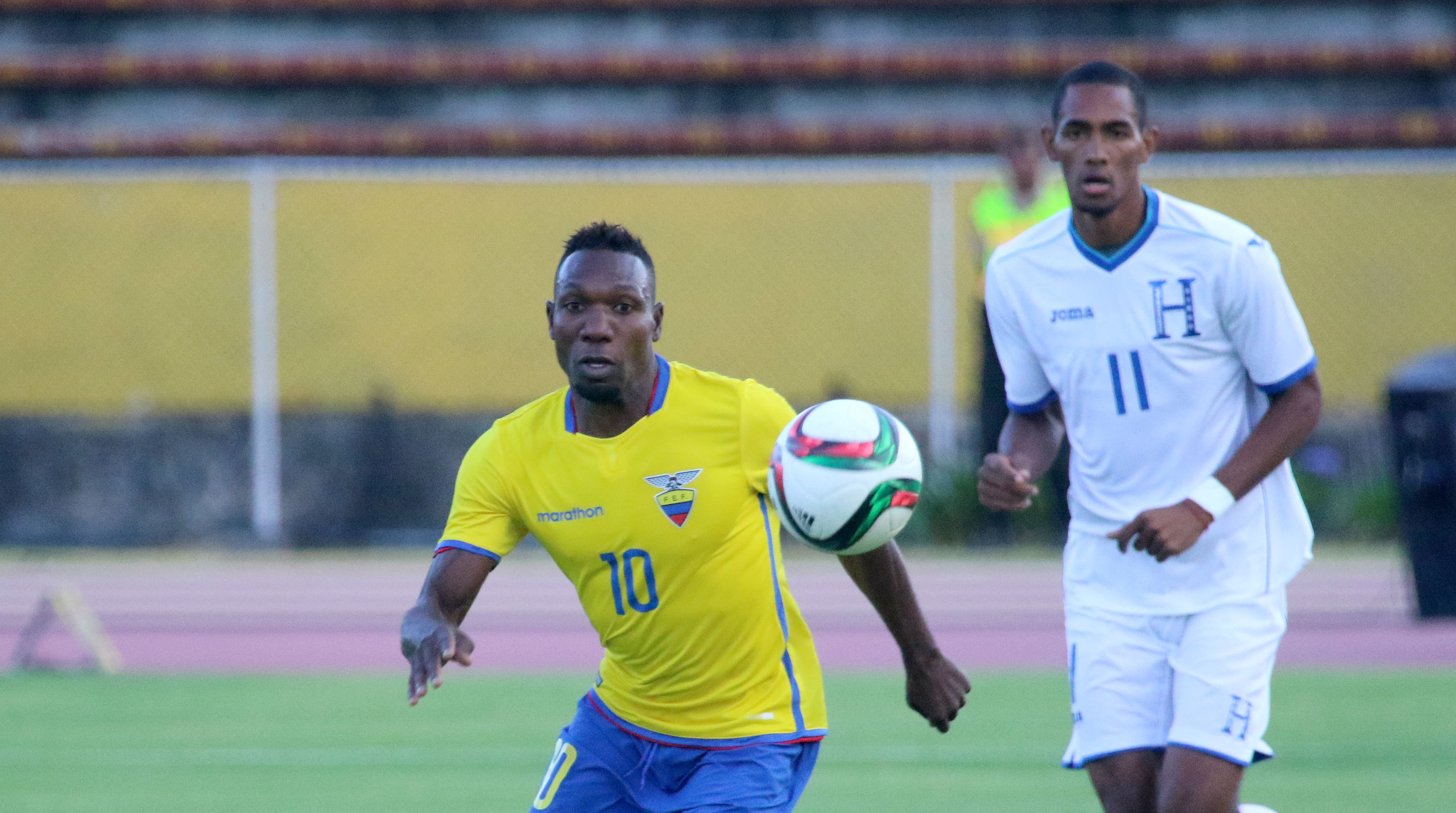 Quito, 08 de sept. (Andes).-Ecuador enfrenta a Honduras en partido amistoso jugado en el estadio Olimpico Atahualpa. En la gráfica Walter Ayoví (10) de Ecuador, disputa el balón con Jerry Bengtson (11) de Honduras. Foto:César Muñoz/Andes